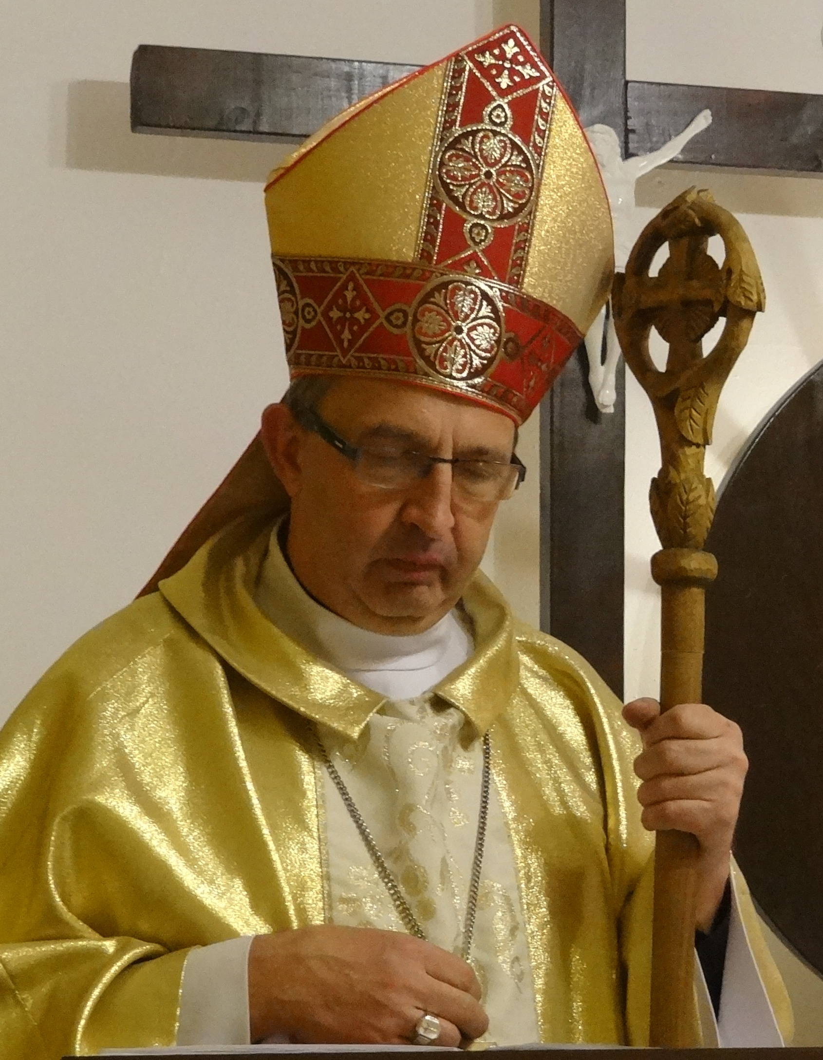 Biskup Adam Rosiek